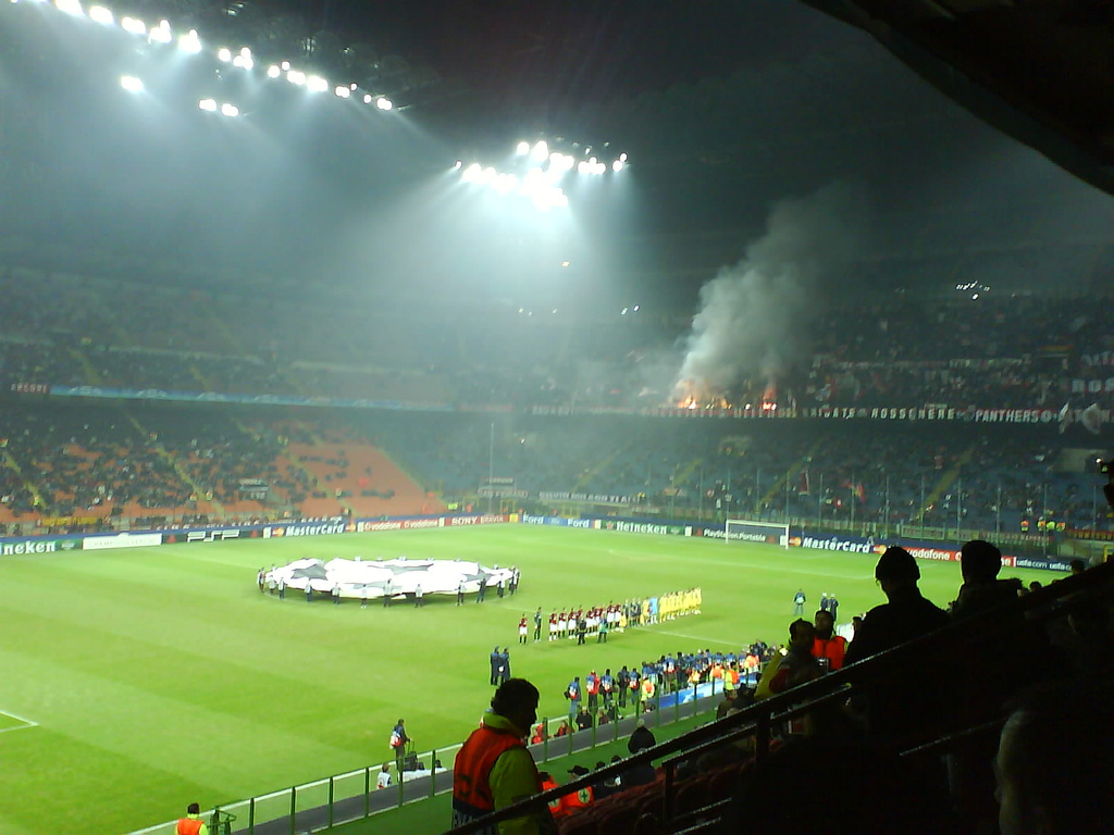 Champions league 2006-07 match. AC Milan - Lille.Milan - Lille, 06/12/06